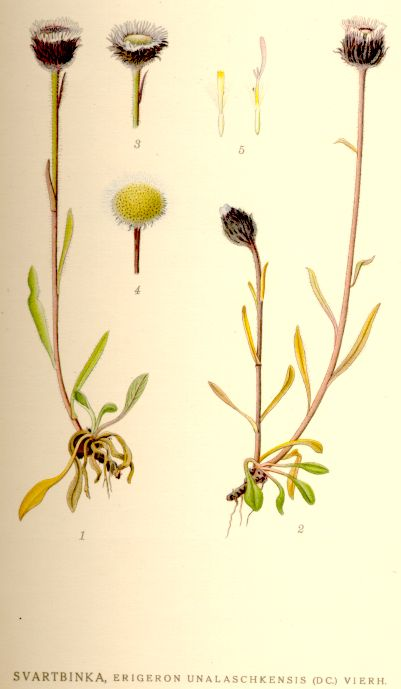 Erigeron unalaschkensis (syn. Erigeron humilis)